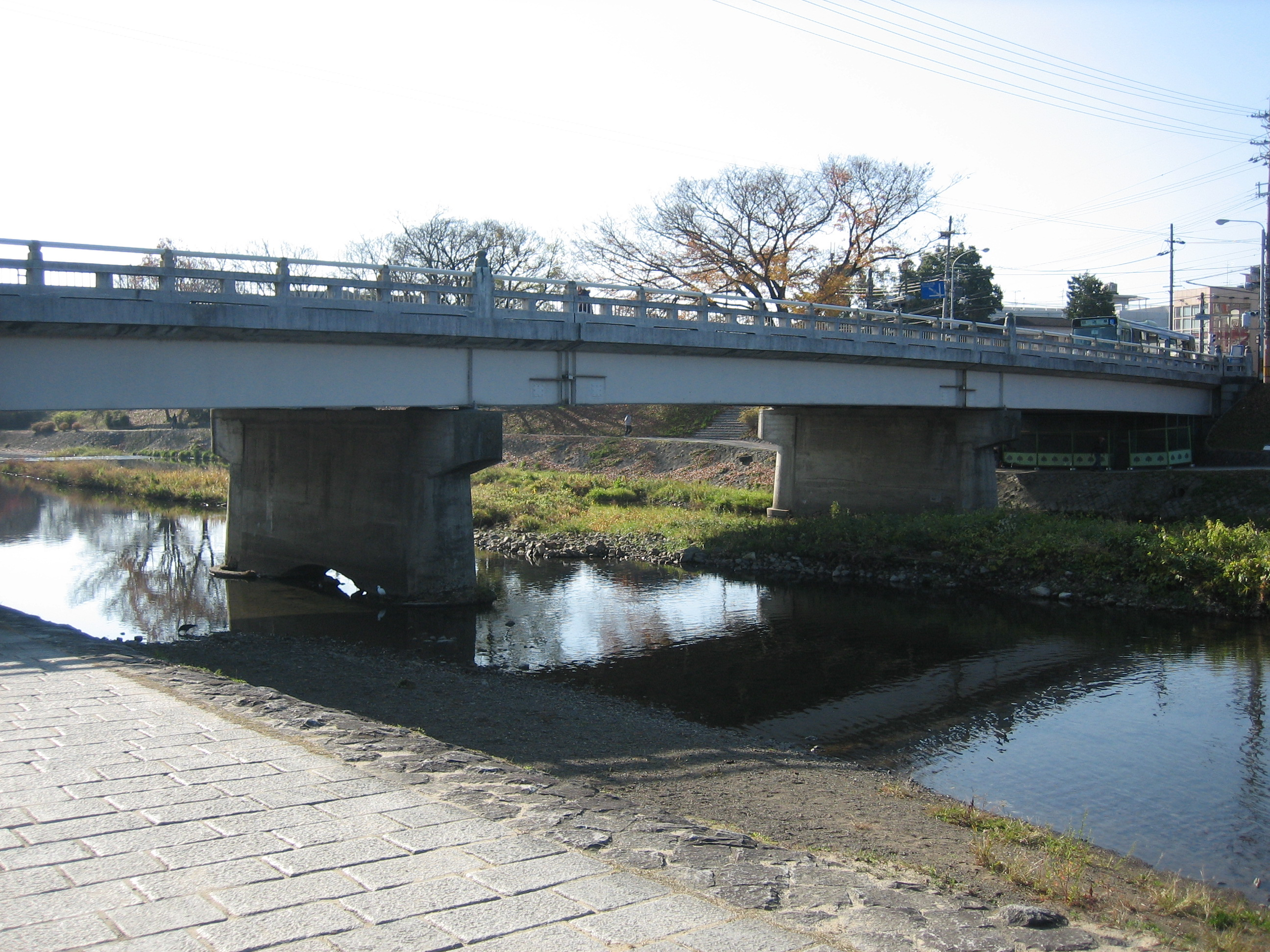 御薗橋を橋東詰河川敷から撮影